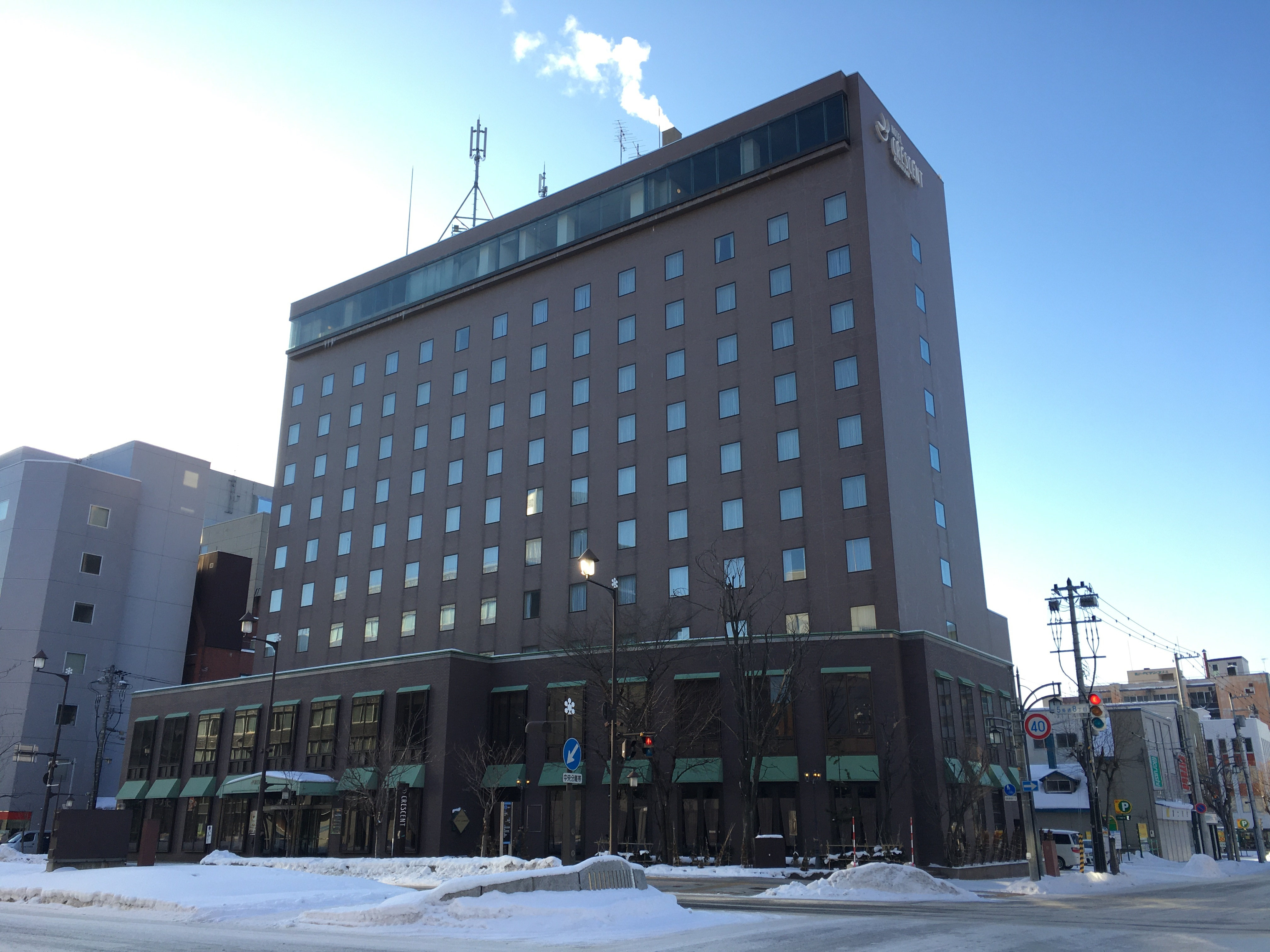 ホテルクレッセント旭川（旭川市）